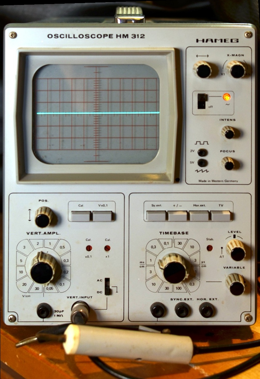 HAMEG Oscilloscope HM 312, 15MHz 1-Kanal von 1974